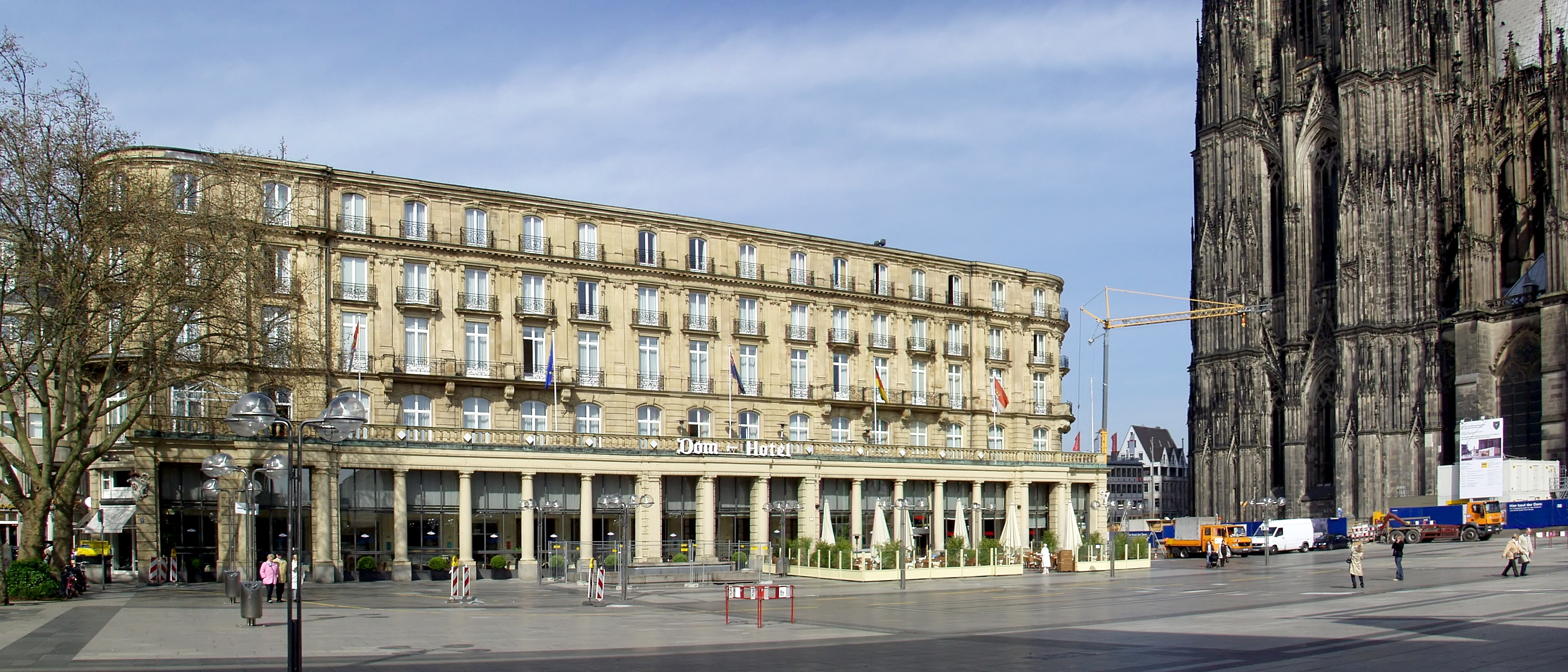 Dom-Hotel am Roncalliplatz, rechts der Südturm des Kölner Domes.